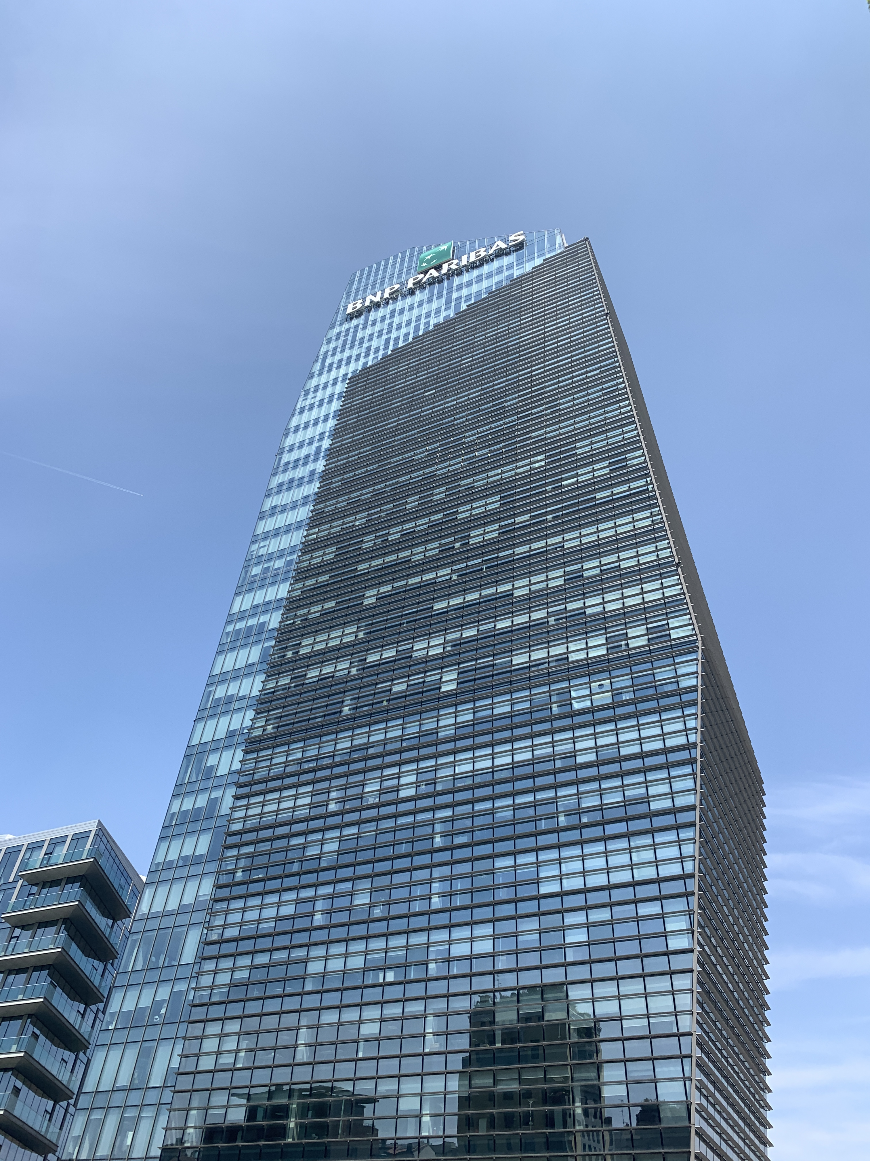 Torre Diamante a Milano.